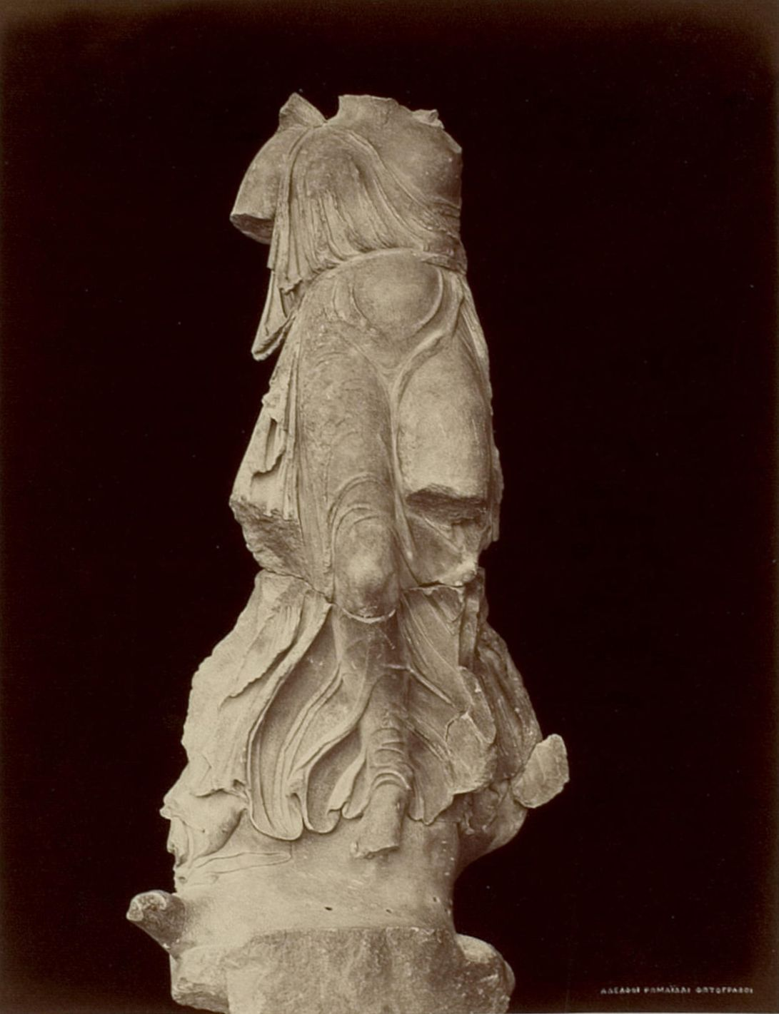 Nike des Paionios von Mende (Pausanias V. 26, 1) gefunden am 21.December 1875 an der auf dem Situationsplane mit a. bezeichneten Stelle, vor der Südostecke des Tempels und über 3 M. unter dem jetzigen Boden; der obere Theil im Sande liegend, der untere als Bestandtheil einer Mauer, zu welcher auch der Inschriftblock des Paionios (s. Taf. VII) gehörte. Höhe von der Fußspitze bis zum Hälfe 1,74 M. Aus dem Felsen auf den sie herabschwebt, fliegt ein Vogel (Adler? Möve?) heraus. Von den acht dreieckigen Blöcken, welche die Haus bildeten und zusammen eine Höhe von 4,60 M. haben, tragen zwei eine umfangreiche Inschrift aus dem zweiten vorchristlichen Jahrhundert, eine Entscheidung über einen zwischen Messeniern und Lakedaimoniern streitigen Landstrich. S. Archaeol. Ztg. 1876. S. 178ff.